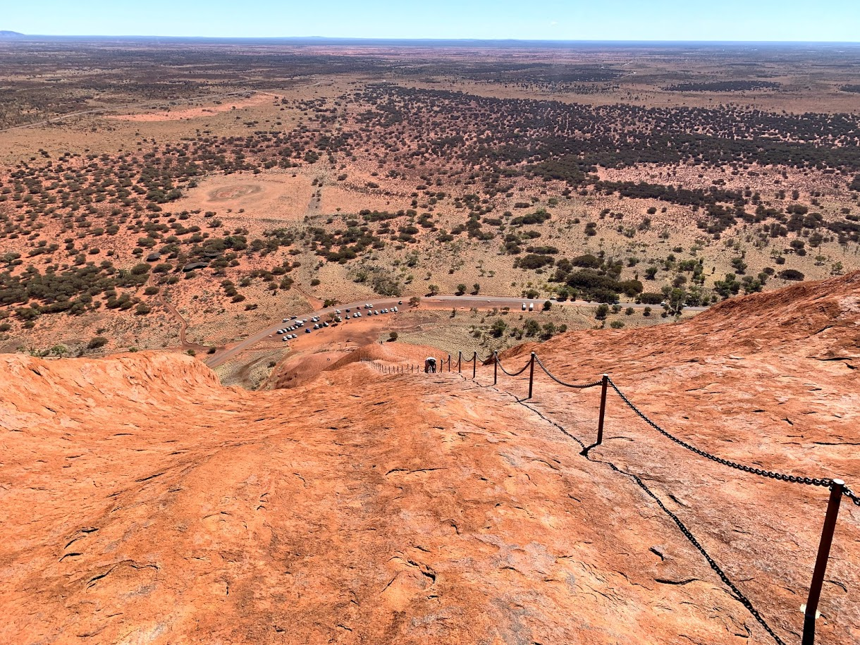 登山道の難関部